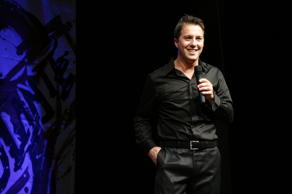 Savino Zaba conduce sul palco